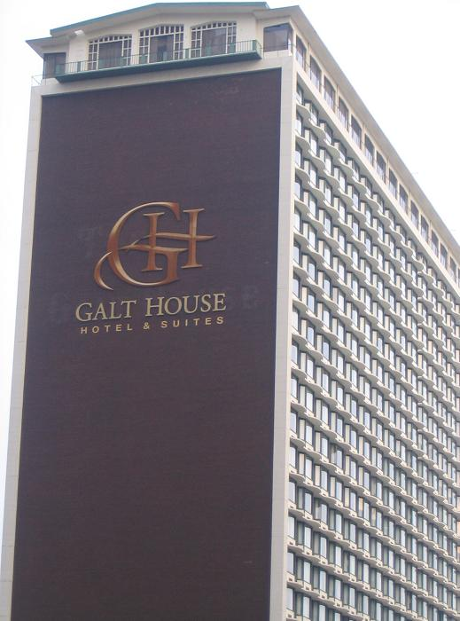 Louisville's Galt House.